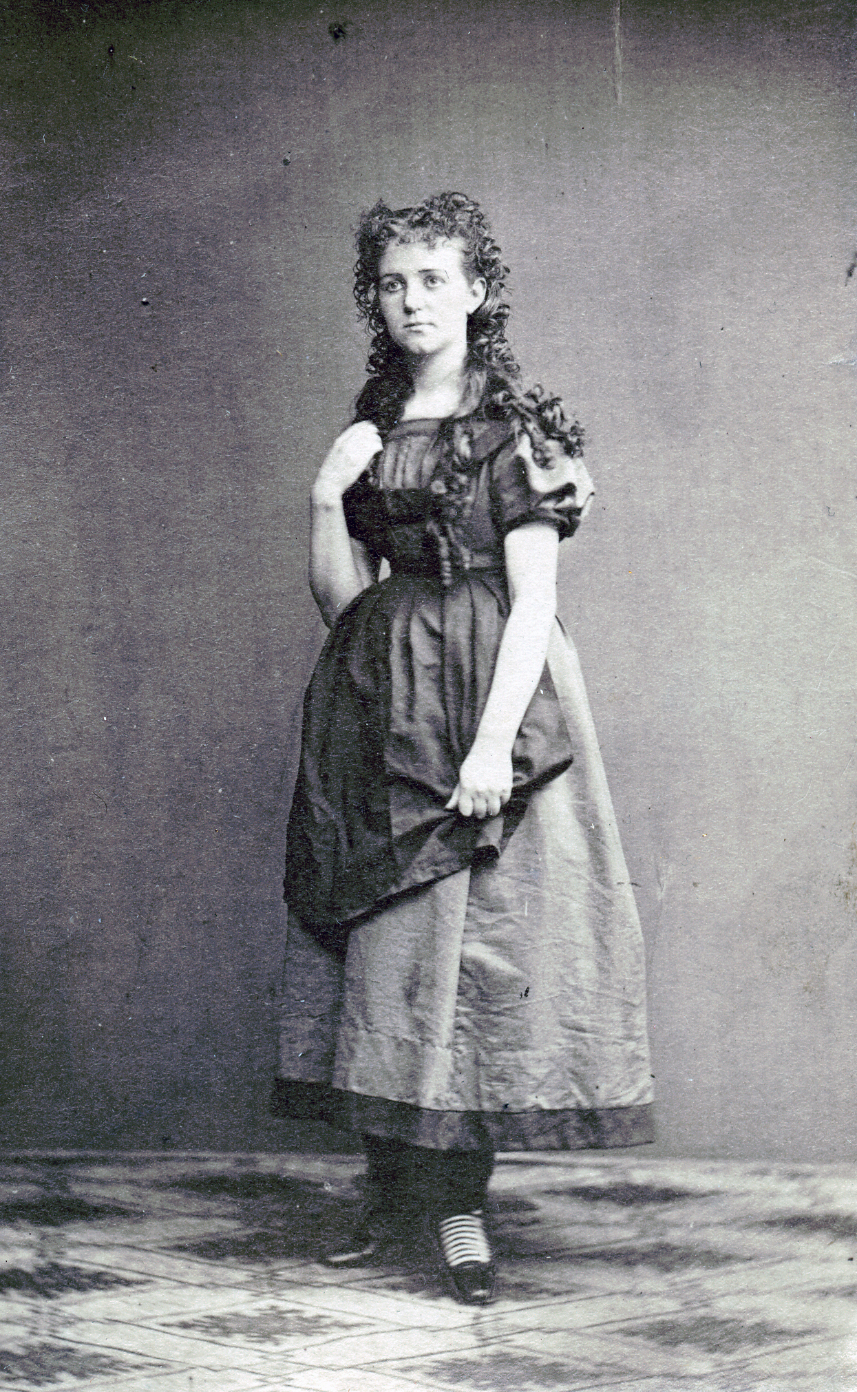 Elise Stier i titelrollen i Jane Eyre, Nya teatern i Helsingfors 1872-73